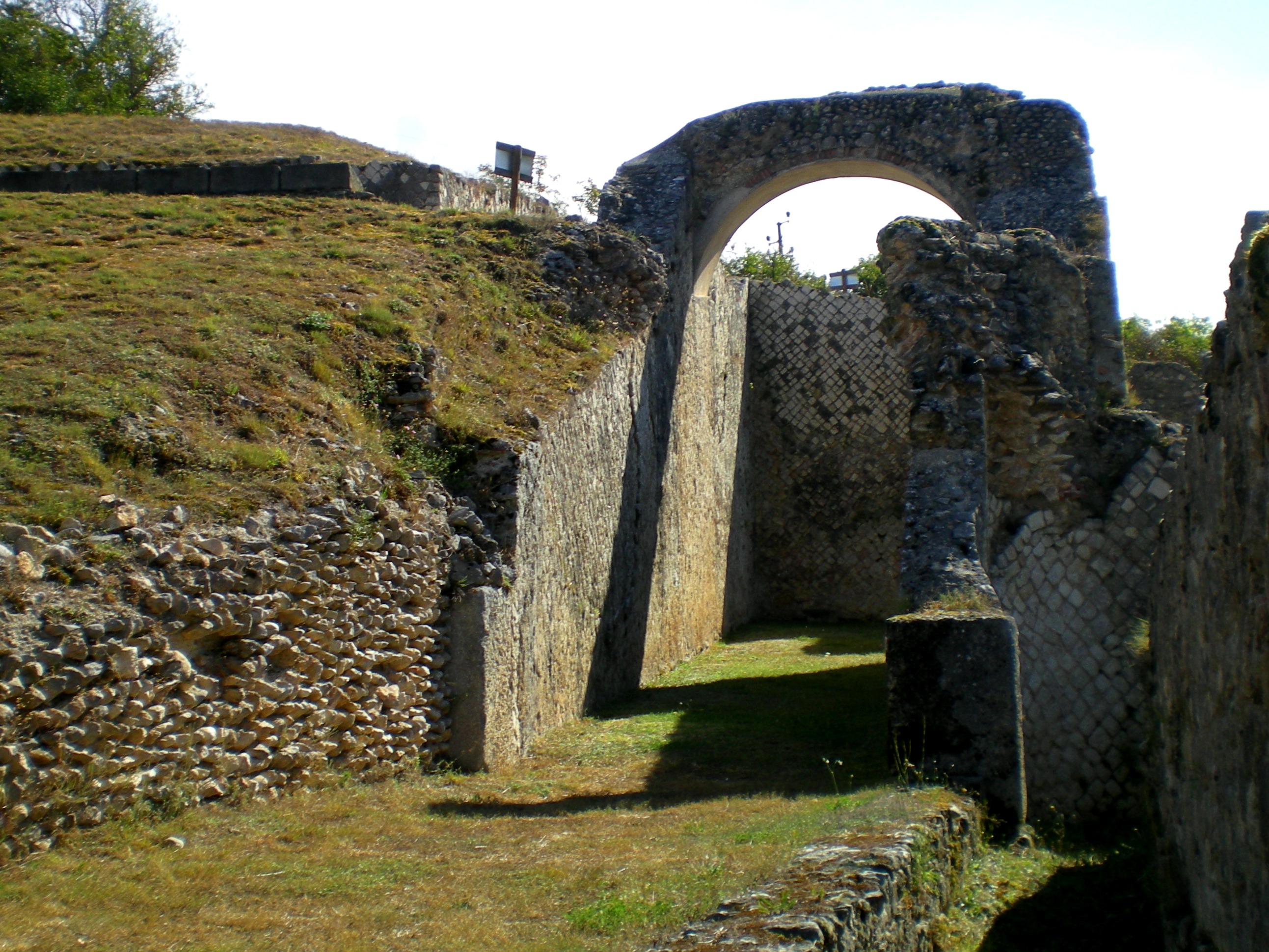 Ingresso alla cavea del teatro romano di Amiternum, situato nei pressi di San Vittorino (L'Aquila)